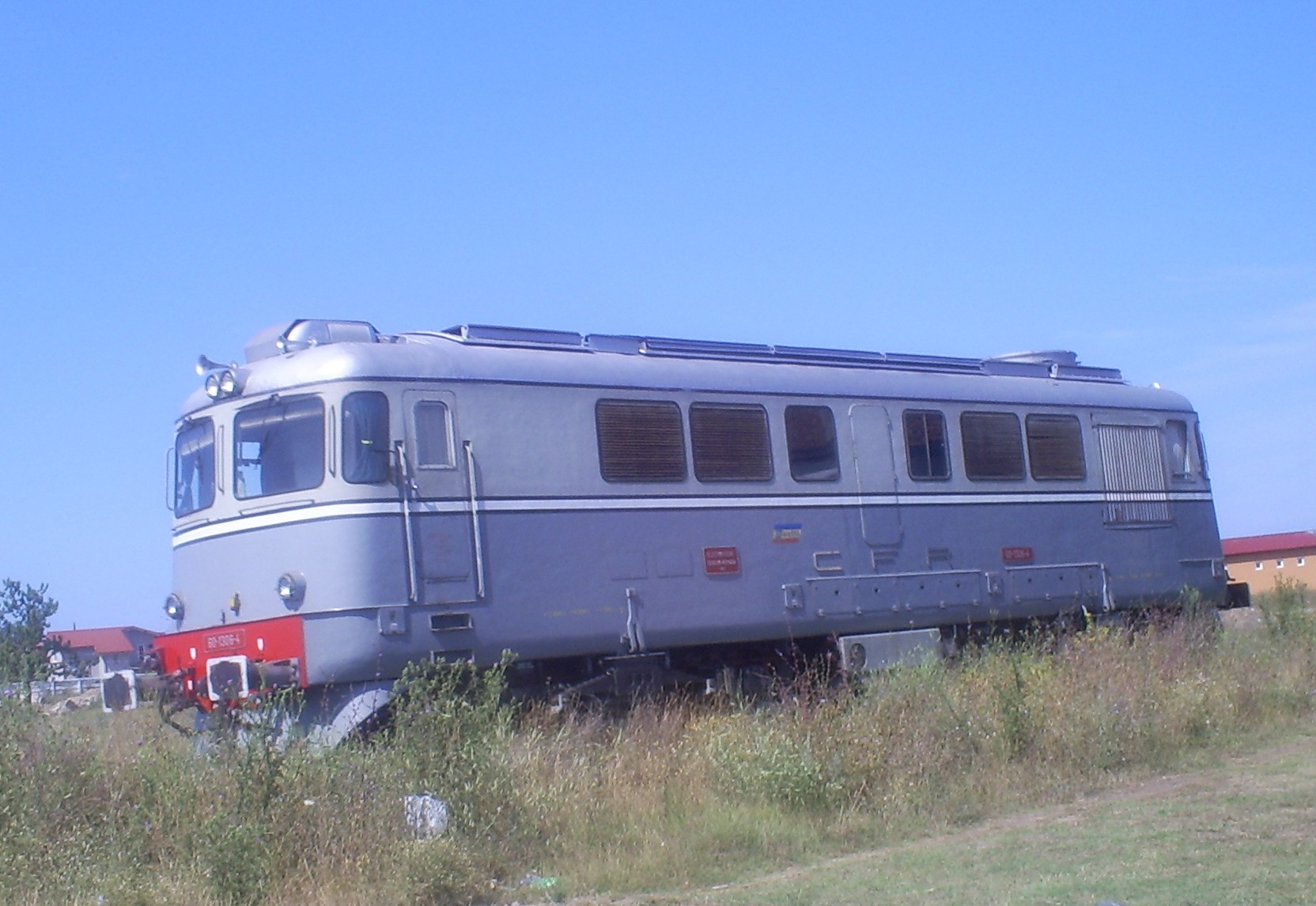 LDE 2100HP CFR-România